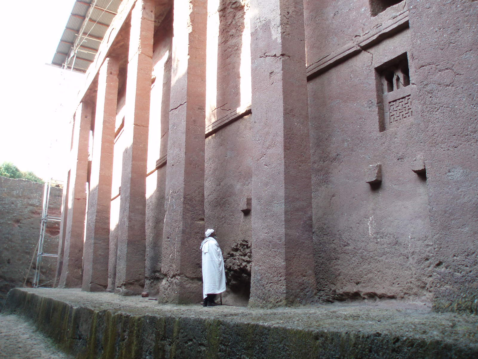 Église de Bet Medhane Alem à Lalibela (Éthiopie)